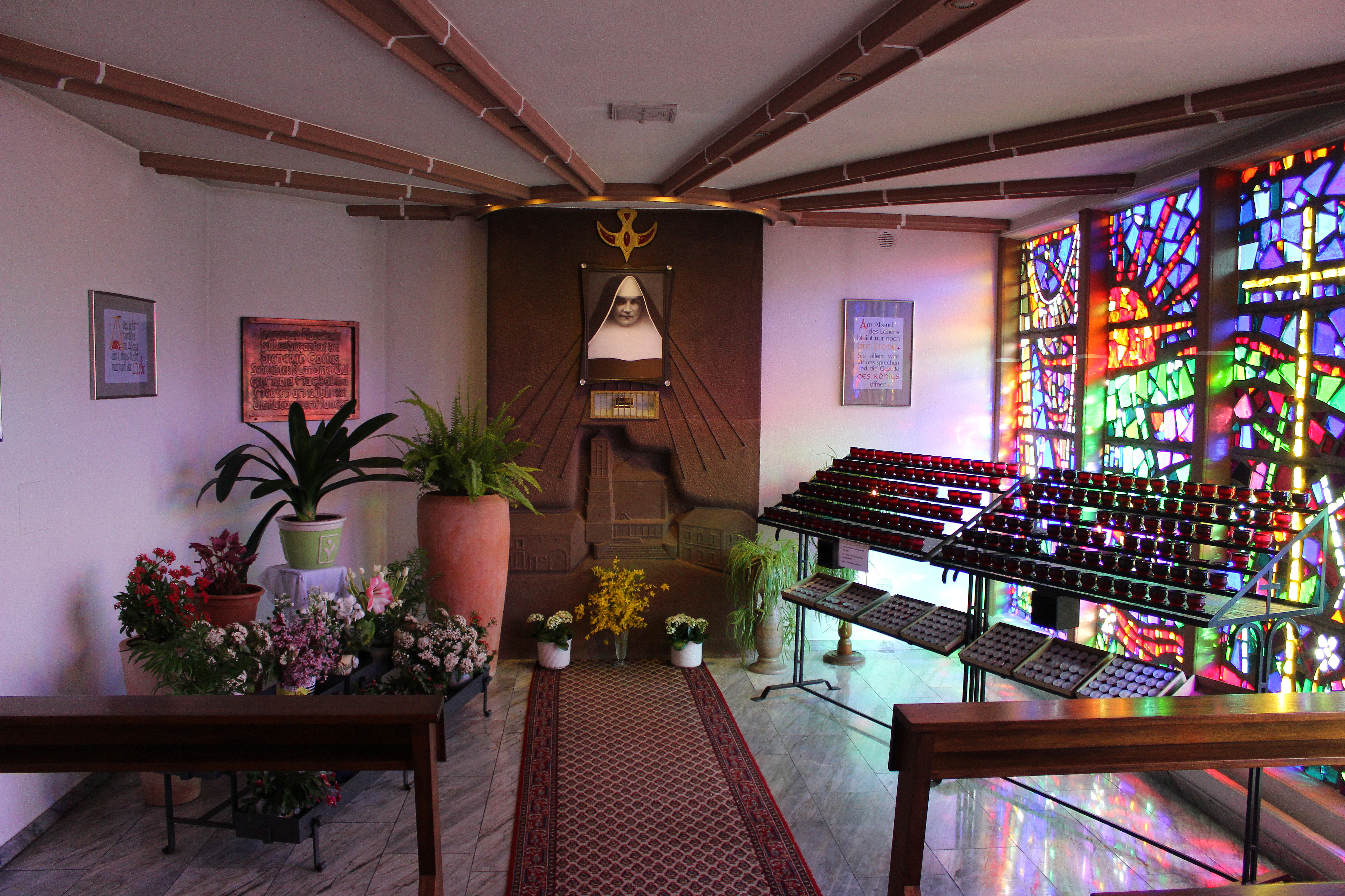 Blandinenkapelle im Eingangsbereich der katholischen Pfarrkirche St. Leodegar in Düppenweiler, einem Ortsteil der Gemeinde Beckingen, Landkreis Merzig-Wadern, Saarland